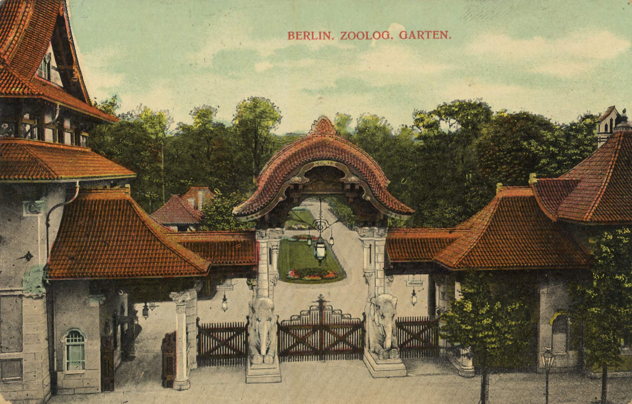 Elefantentor des Zoologischen Gartens Berlin an der Budapester Straße in Berlin-Charlottenburg